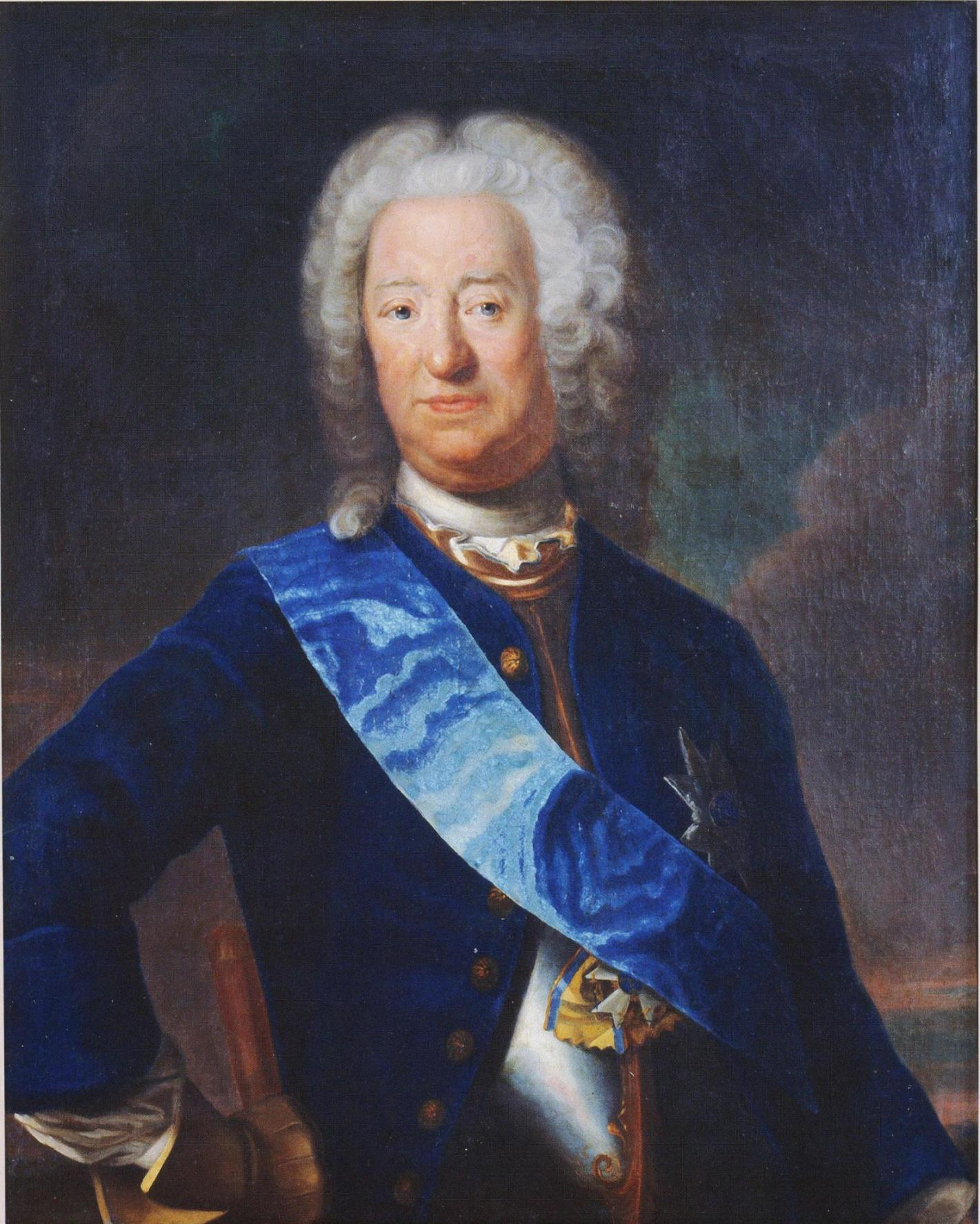 Kenraali Carl Olderman Cronstedt (1672–1750) kälynsä Helena Arnellin maalaamassa muotokuvassa. Maalaus kuuluu valtion taidemuseon kokoelmiin ja on Suomen Kansallismuseossa.